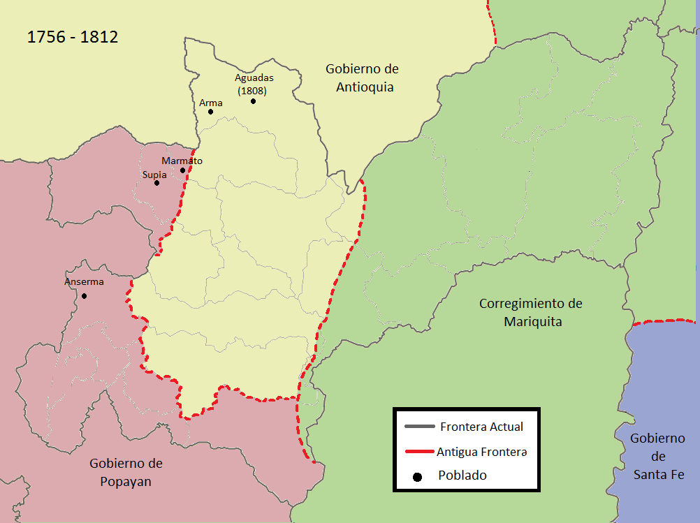 caldas entre 1700